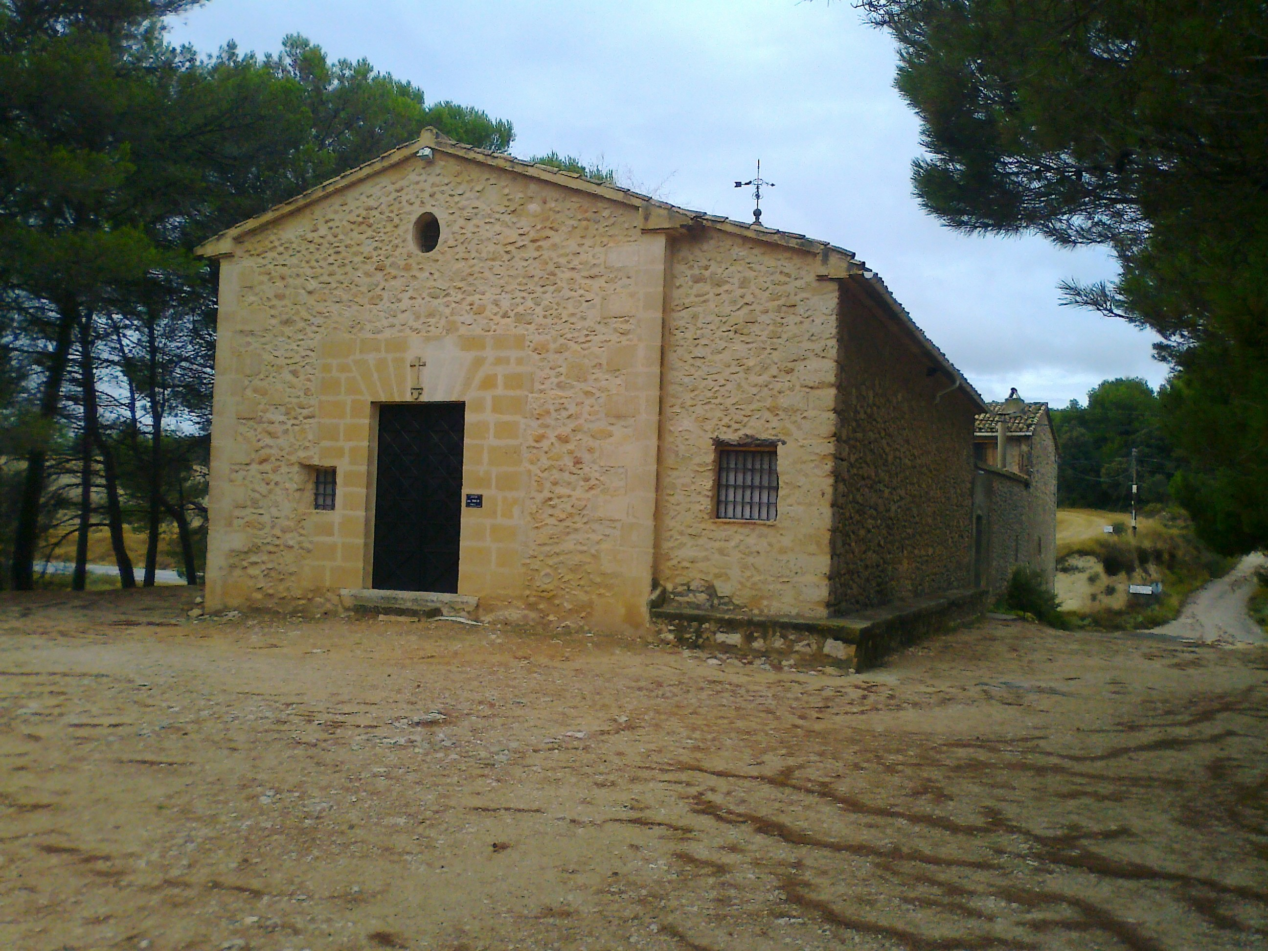 Ermita de la Parroquia de Sant Isidre Llaurador en la Vall de Polop, Alcoy (Alacant).